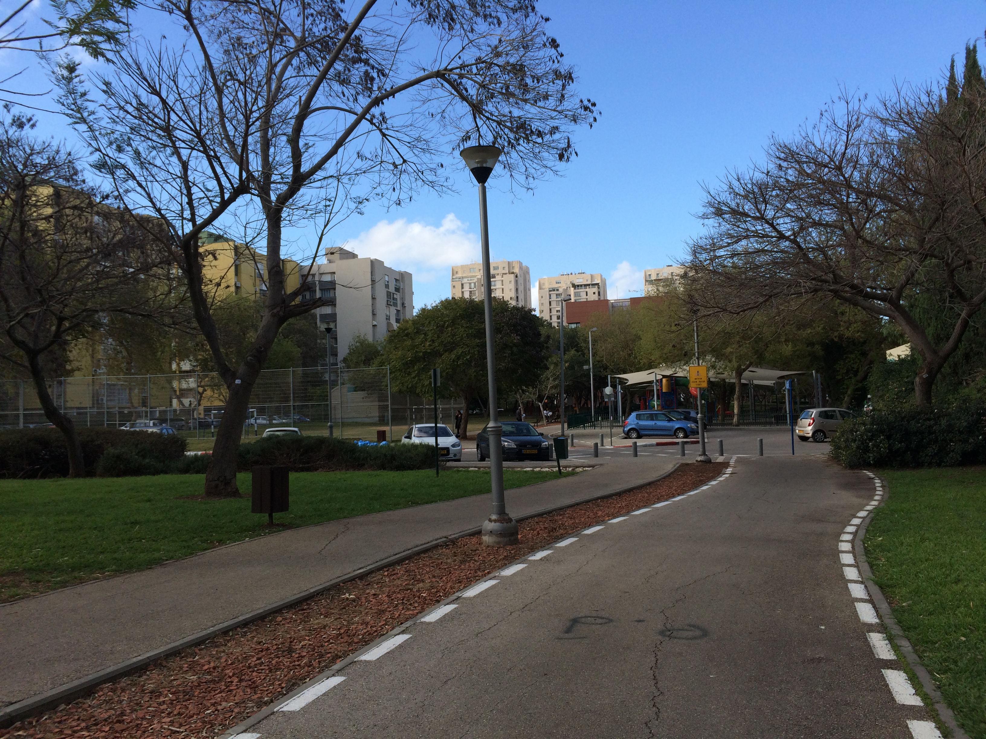 תמונה של שכונת רמת אביב ג׳ שבתל אביב.